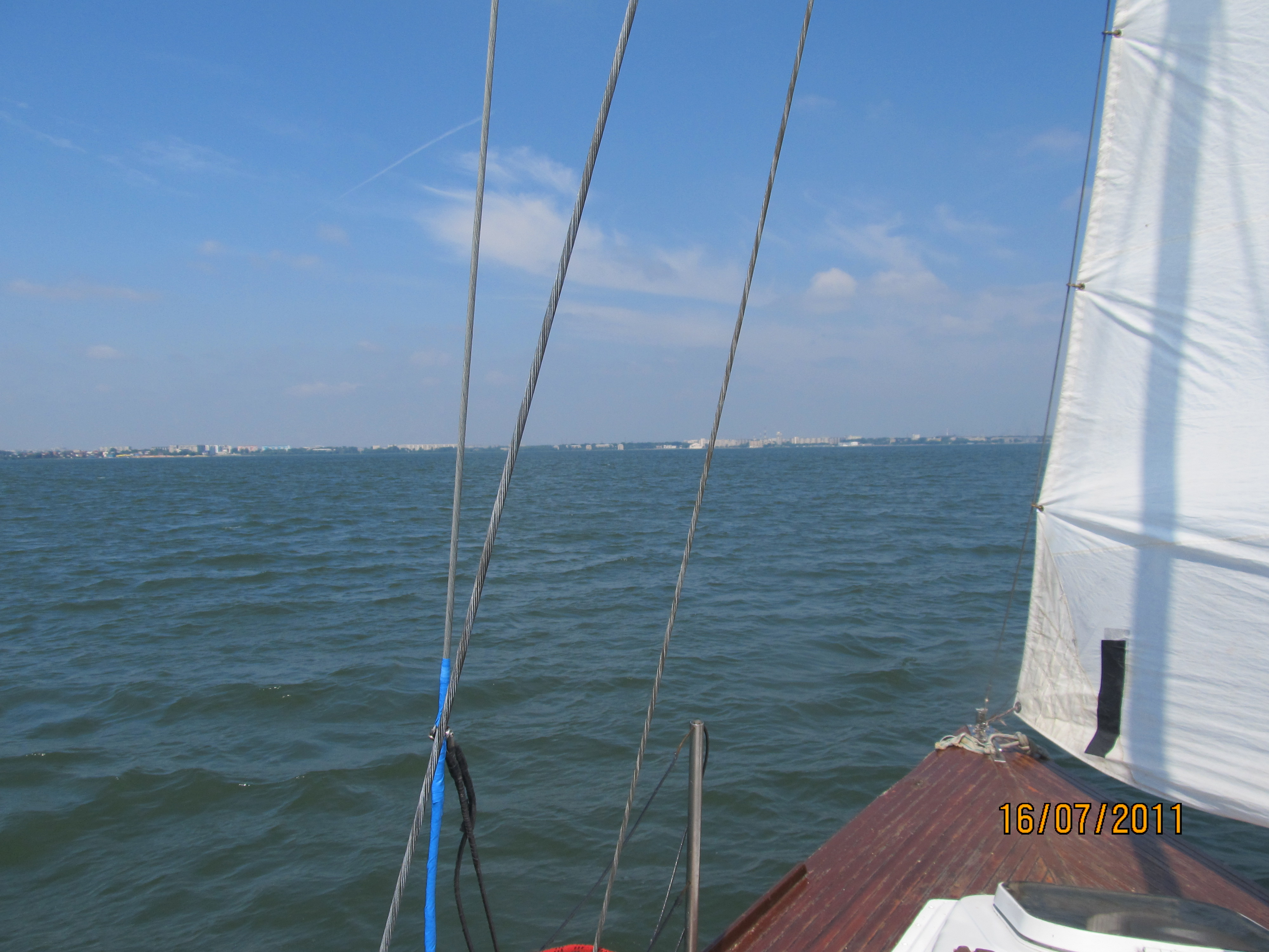 Прогулка на яхте по Смолину озеру: Челябинский городской округ, Челябинская область. This image is related to the protected area of Russia number 7410309